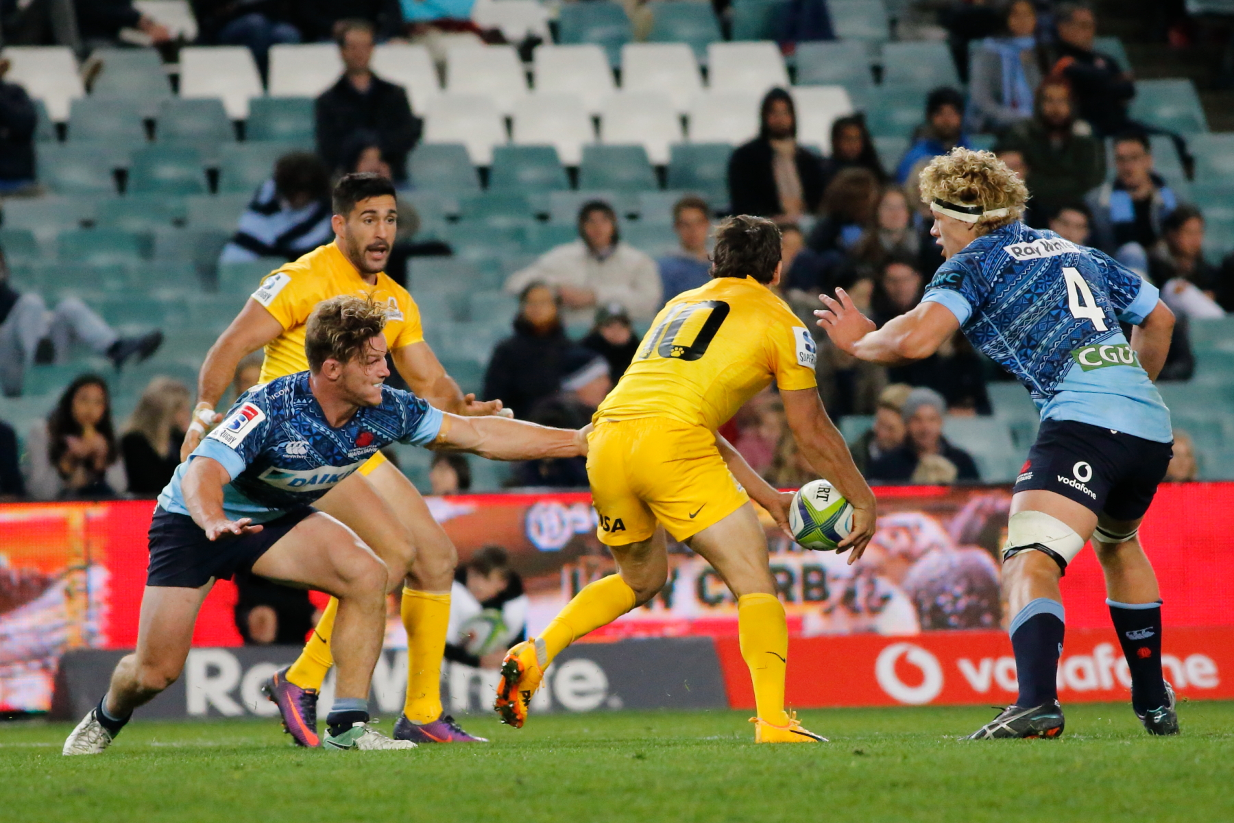 2017.07.08.20.56.58-WARvJAG-0002